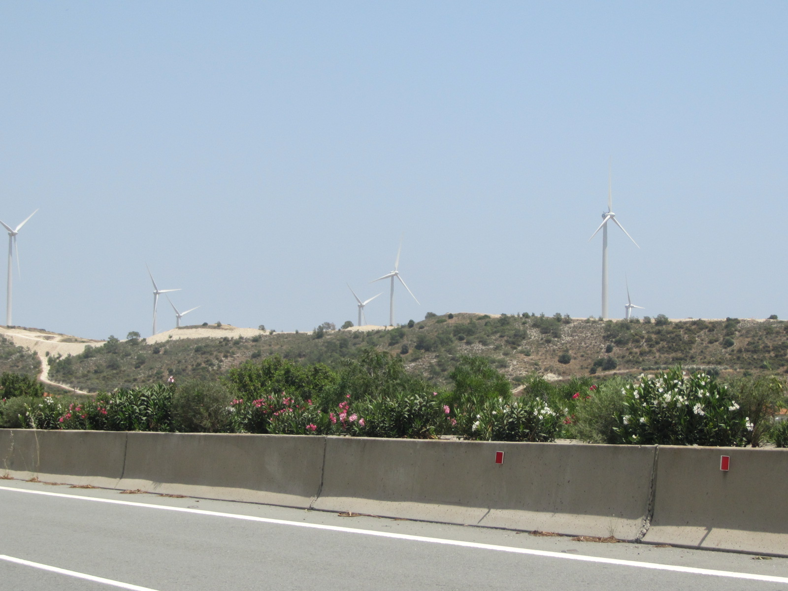 Cyprus motorway